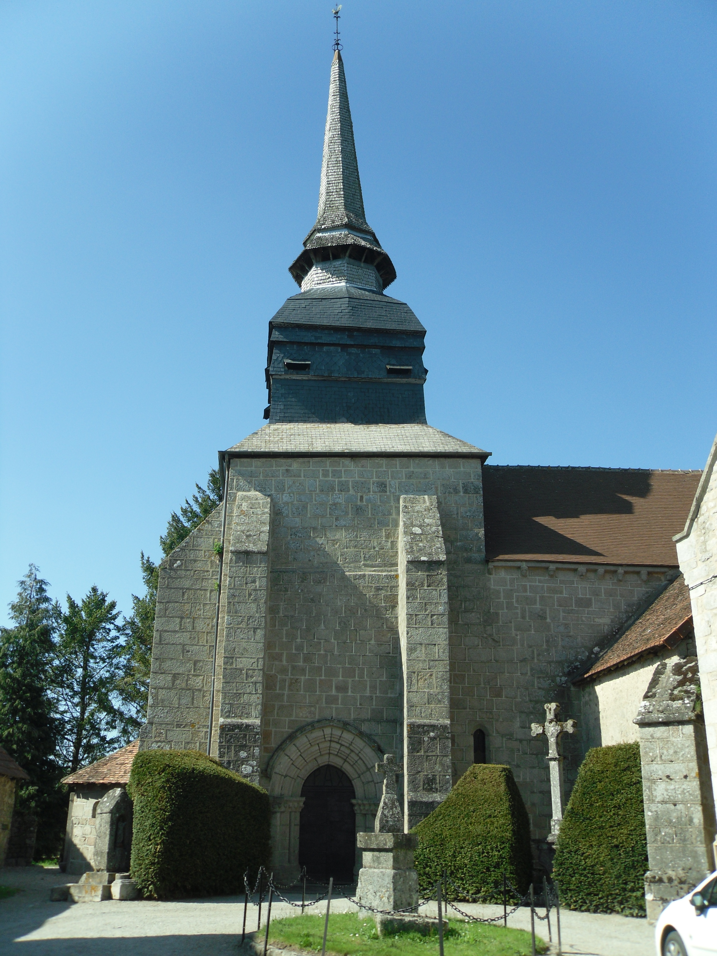 Eglise